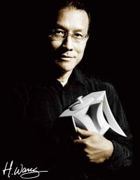 HEINRICH WANG's PROFILE PICTURE